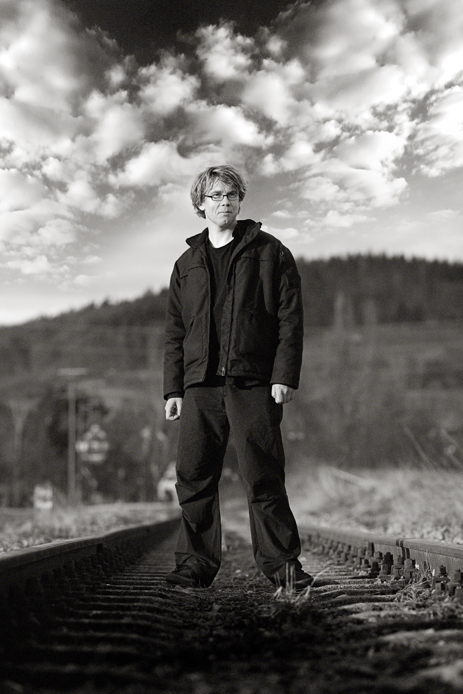 ARTE Quartett Pressefoto 2009